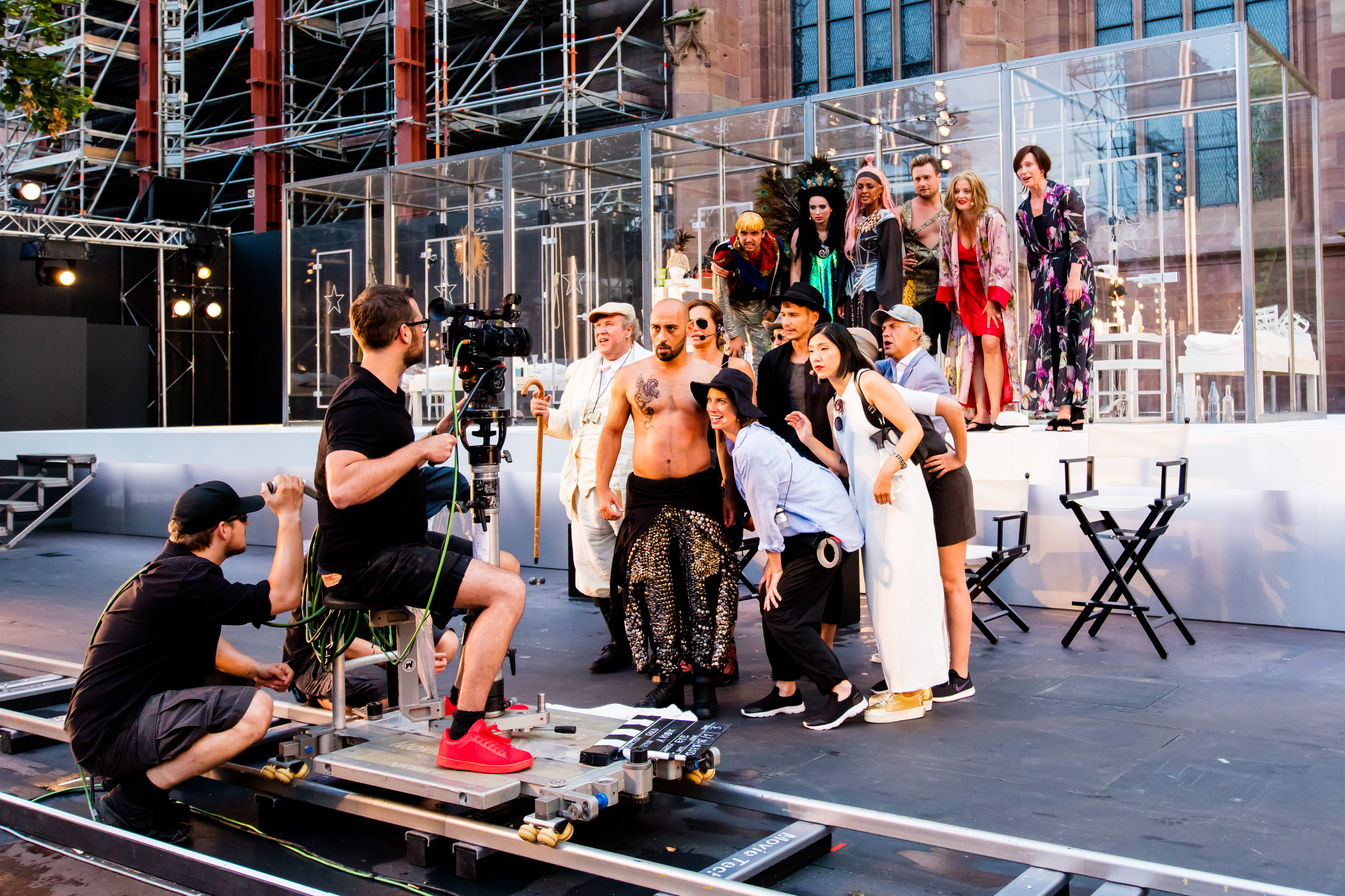 2016: Uraufführung: "GOLD. Der Film der Nibelungen" Regie: Nuran David Calis Autor: Albert Ostermaier Intendant: Nico Hofmann --- Ensemble: Produzent Konstantin Trauer: Uwe Ochsenknecht Regisseur Arsenij Kubik: Vladimir Burlakov Drehbuchautor Charlie P. Weide: Josef Ostendorf Society Reporter Peter Scheumer: Dominic Raacke Kamerafrau "the eye": Anna Rot Setdesignerin "set": Joy Maria Bai Assistentin des Produzenten Carmen: Alexandra Kamp Maskenbildnerin Sueyla Blume : Ayse Bosse die Ältere Kriemhild Karina Bergmann: Katja Weitzenböck die Jüngere Kriemhild Simone Gehel: Constanze Wächter die Ältere Brünhild Lotte Jünger: Michaela Steiger die Jüngere Brünhild Nathalie Aurun: Dennenesch Zoudé Siegfried Mohamad Söder: Ismail Deniz Hagen René Inner: Sascha Göpel Gunther Klaus Castel: Maximilian Laprell Bürgermeister Franz Koppoler: Heiner Lauterbach during Nibelungenfestspiele "GOLD. Der Film der Nibelungen" at Wormser Kaiserdom, Worms, Rheinland Pfalz, Germany on 2016-07-12, Photo: Sven Mandel